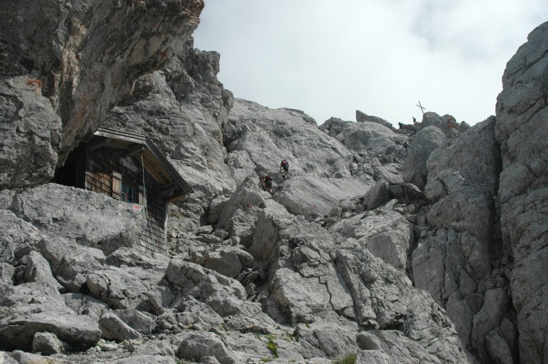 Babenstuberhutte a vrcholovy kriz Ellmauer Halt